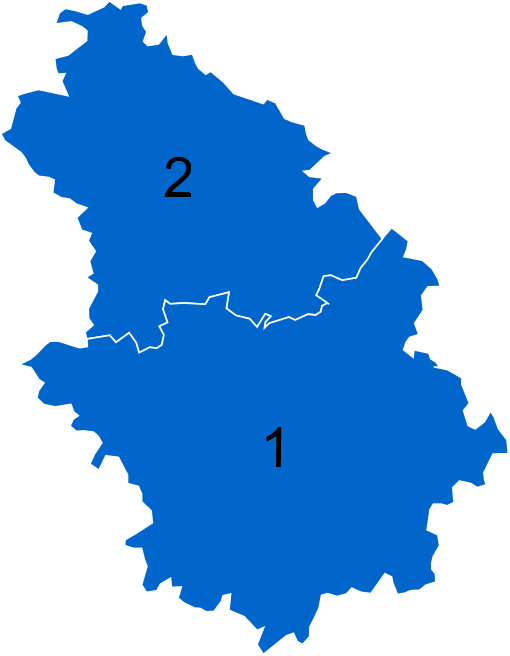 Résultats des élections législatives de la Haute-Marne en 2012